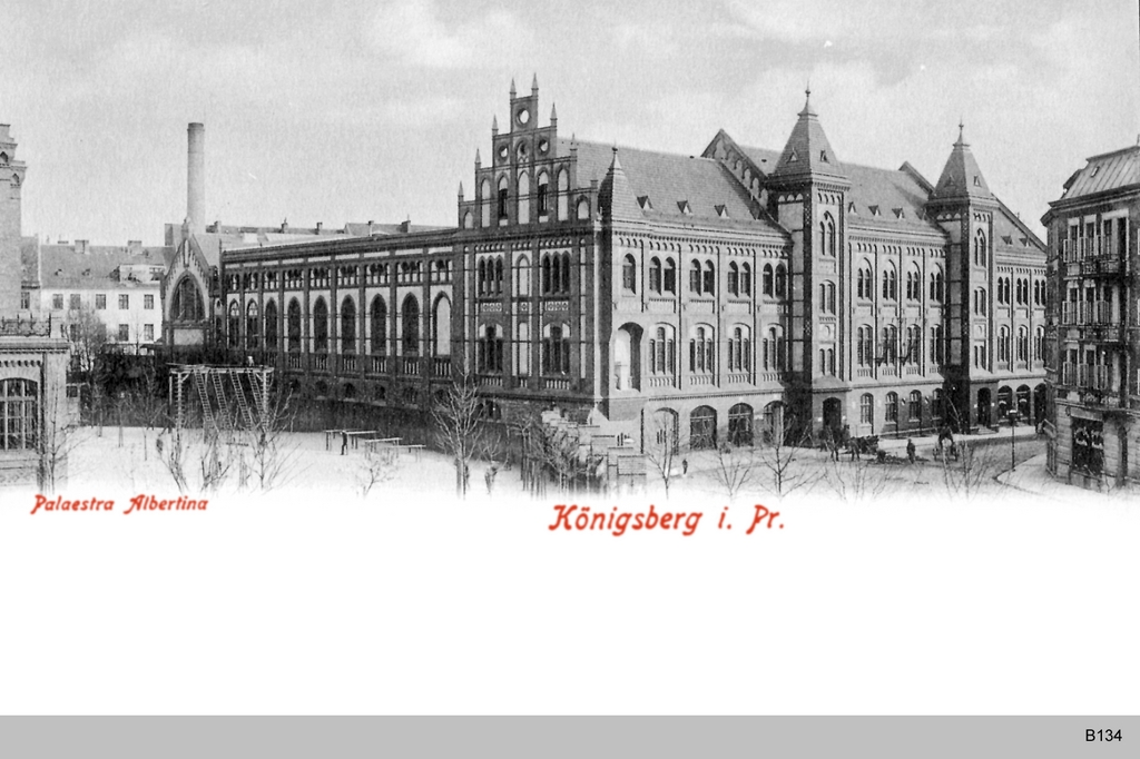 Palästra Albertina in Königsberg